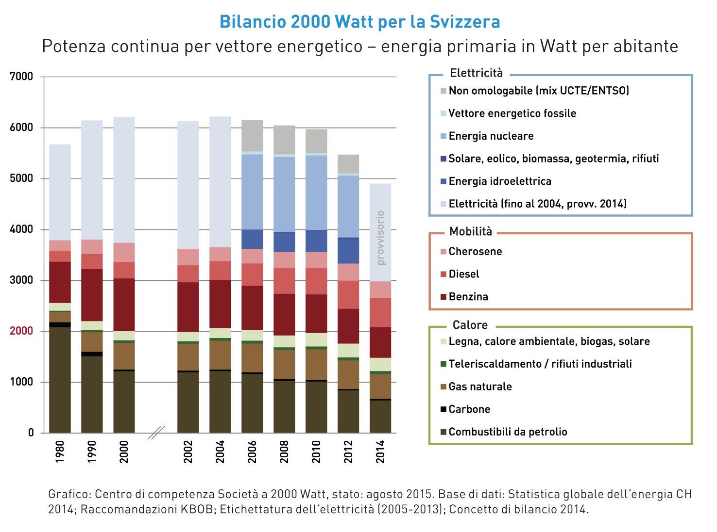 2000-Watt-Bilancio per la Svizzera (Ufficio specializzato Società a 2000 Watt)